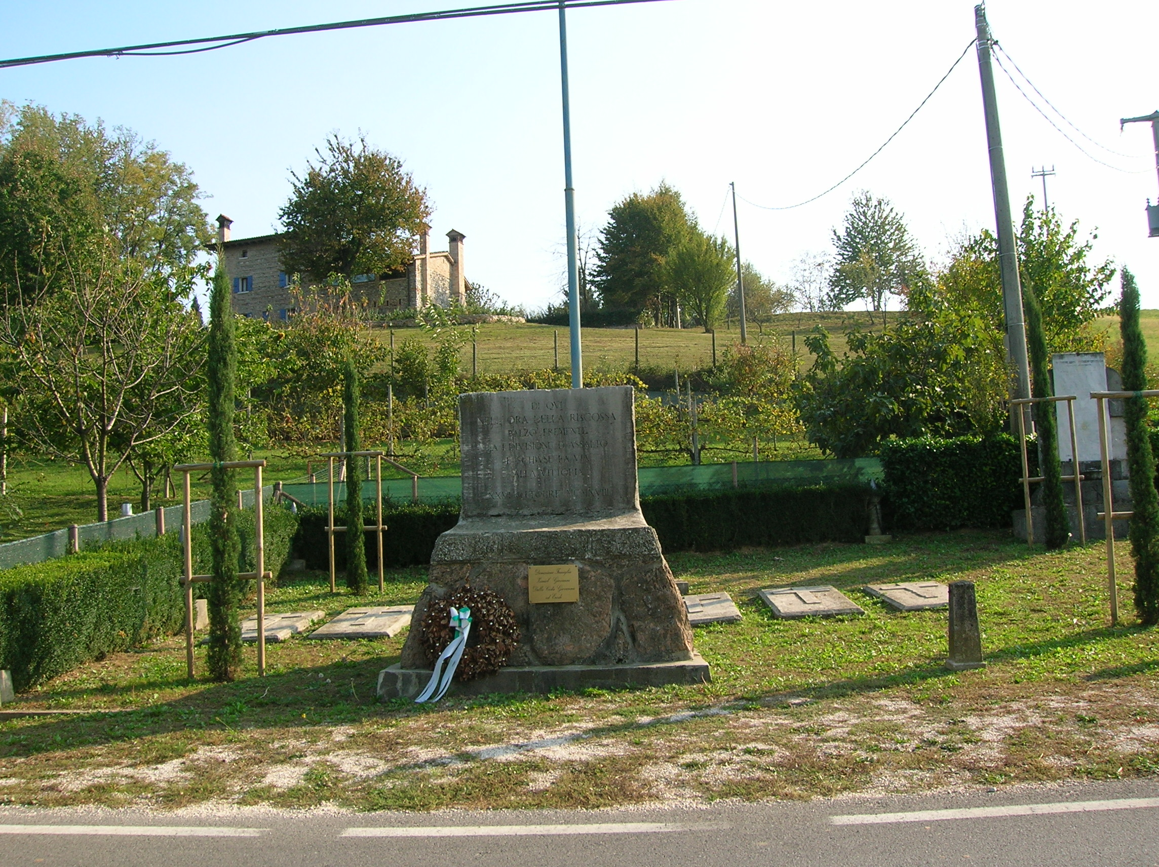 Monumento a ricordo degli arditi morti nella battaglia del solstizio a Ciano del Montello (Tv) altre foto qui